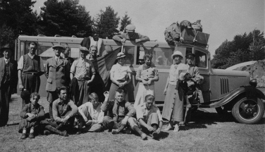 NS (Norwegian Nazi party) members on excursion. Stop Fevik a summer in 1935. In the middle, behind group, NS flag: yellow cross on a red background. In 1935 NS a small and rather insignificant party. Arkivreferanse: PA-0781 NS fotosamling Fce4_471